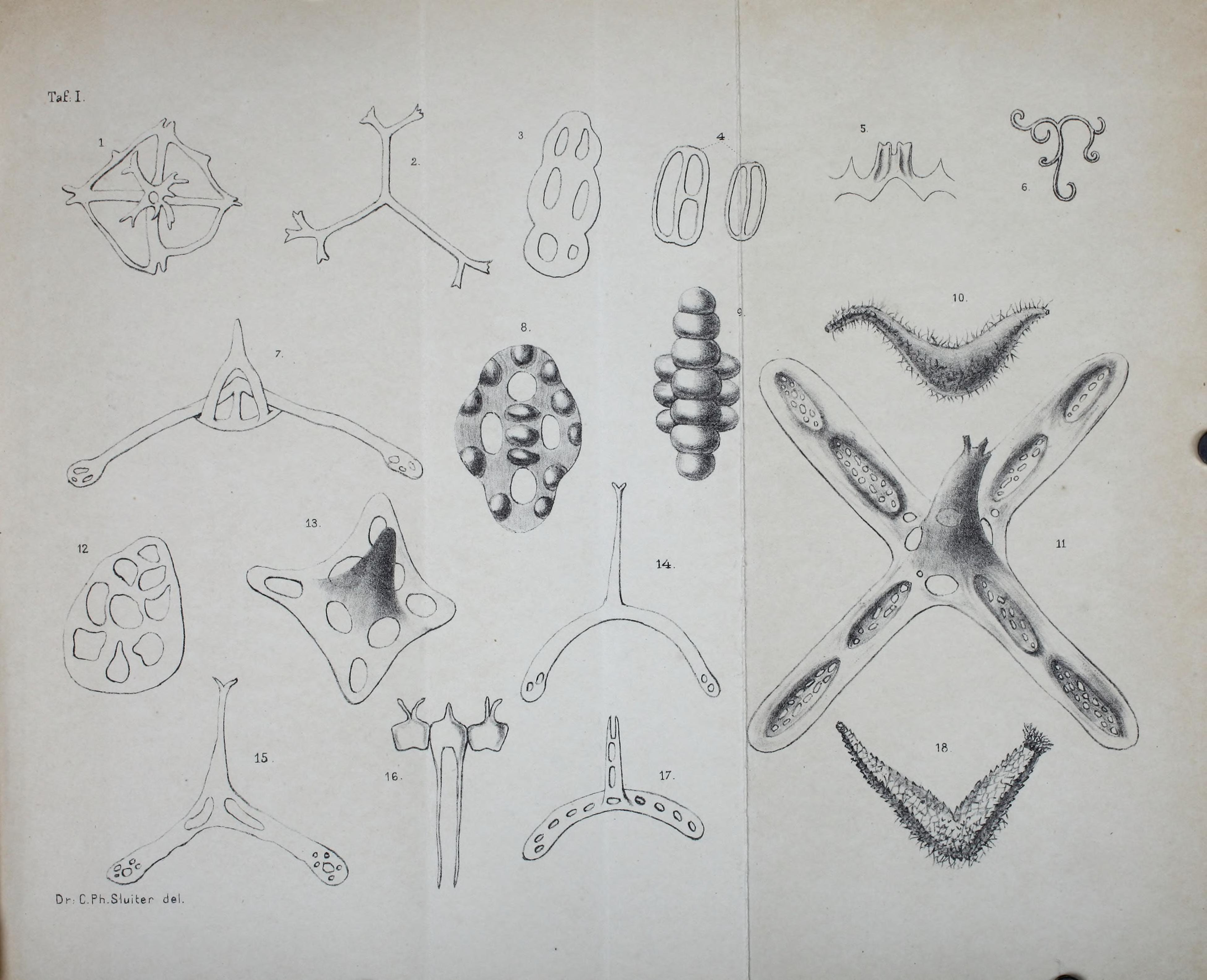 Natuurkundig tijdschrift voor Nederlandsch Indië / uitgegeven door de Natuurkundige Vereeniging in Nederlandsch Indië.